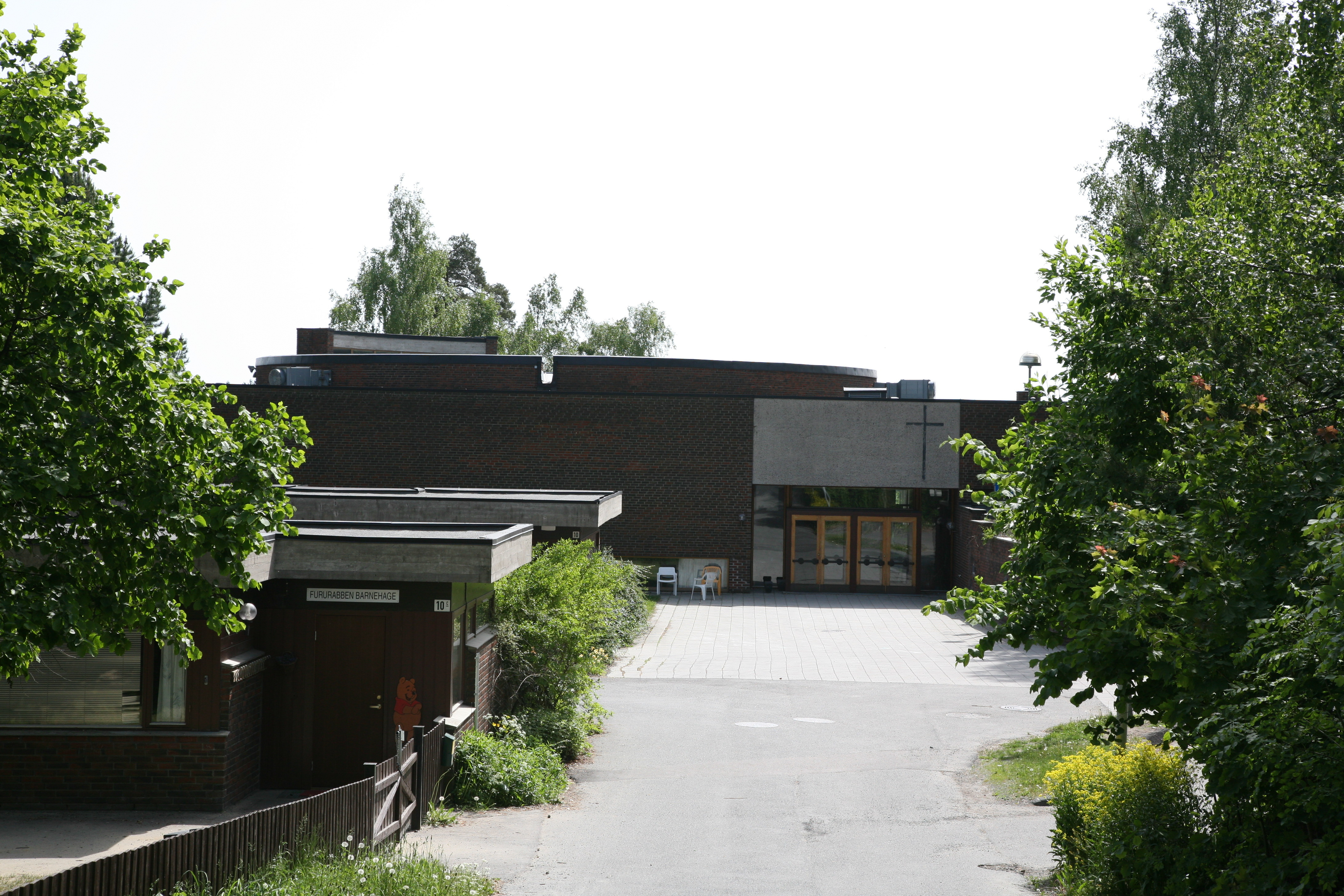 Østerås church in Bærum, Norway